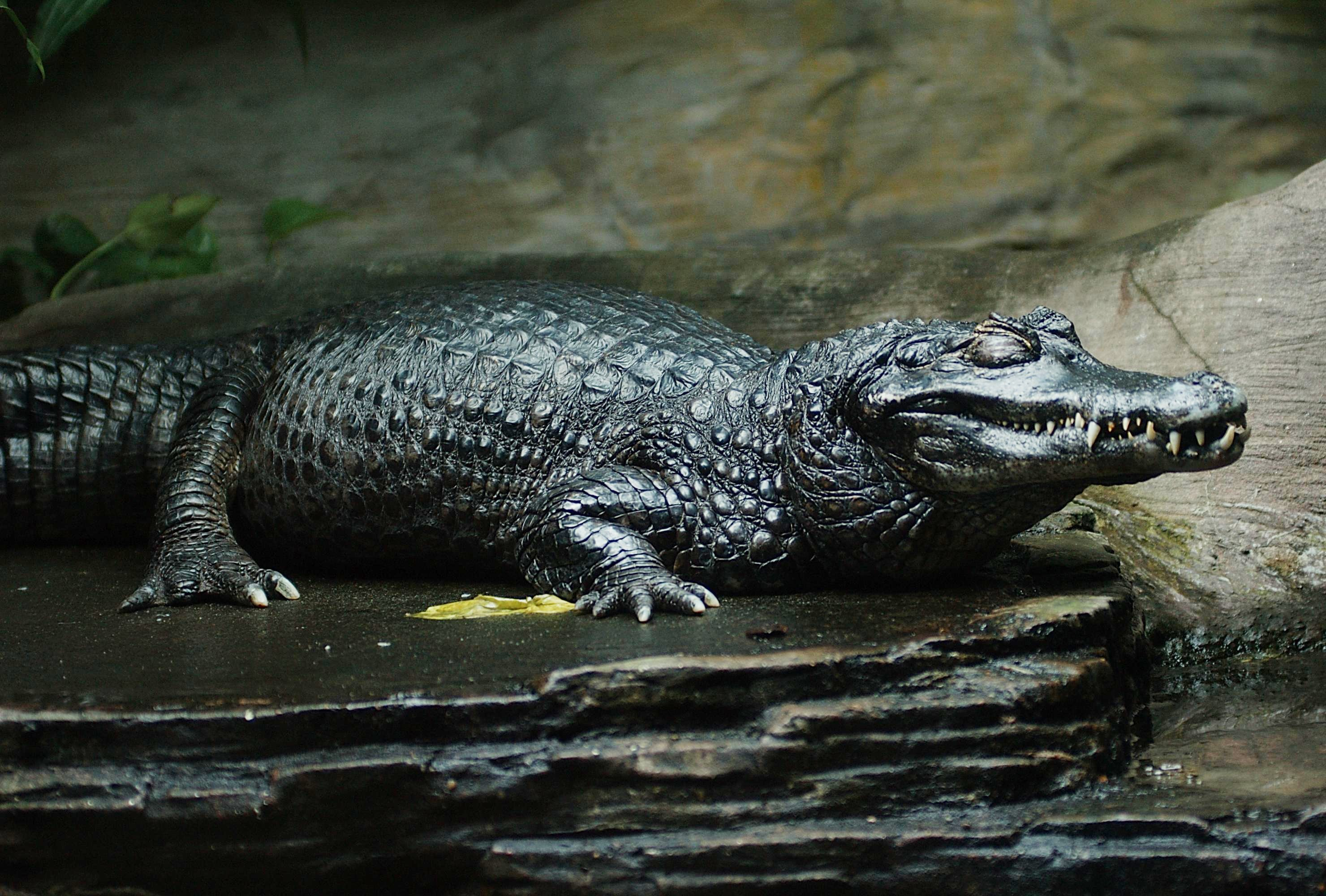 Melanistic Caiman crocodilus